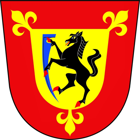 Černotín znak